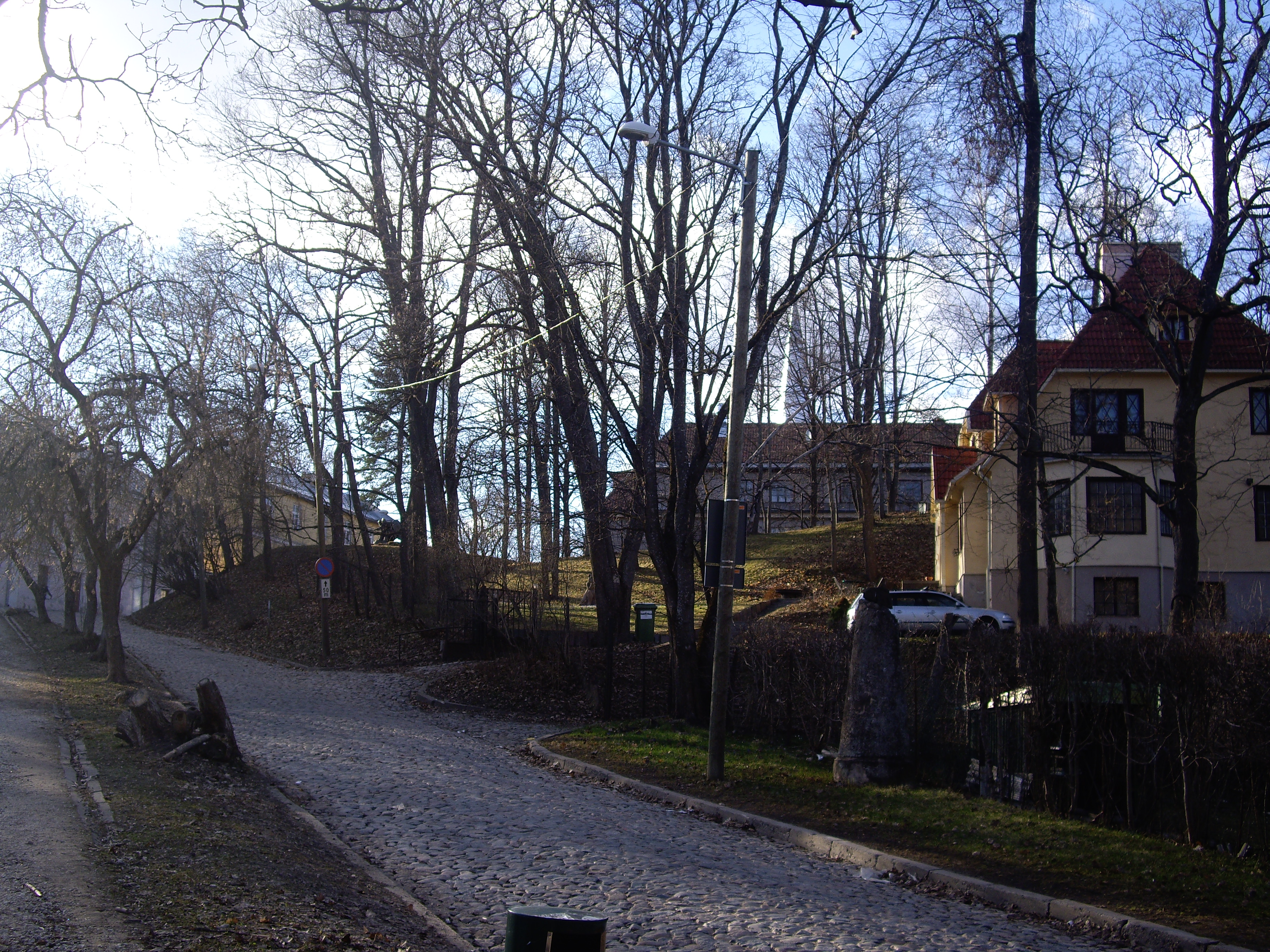 Oru tänav Tartus.